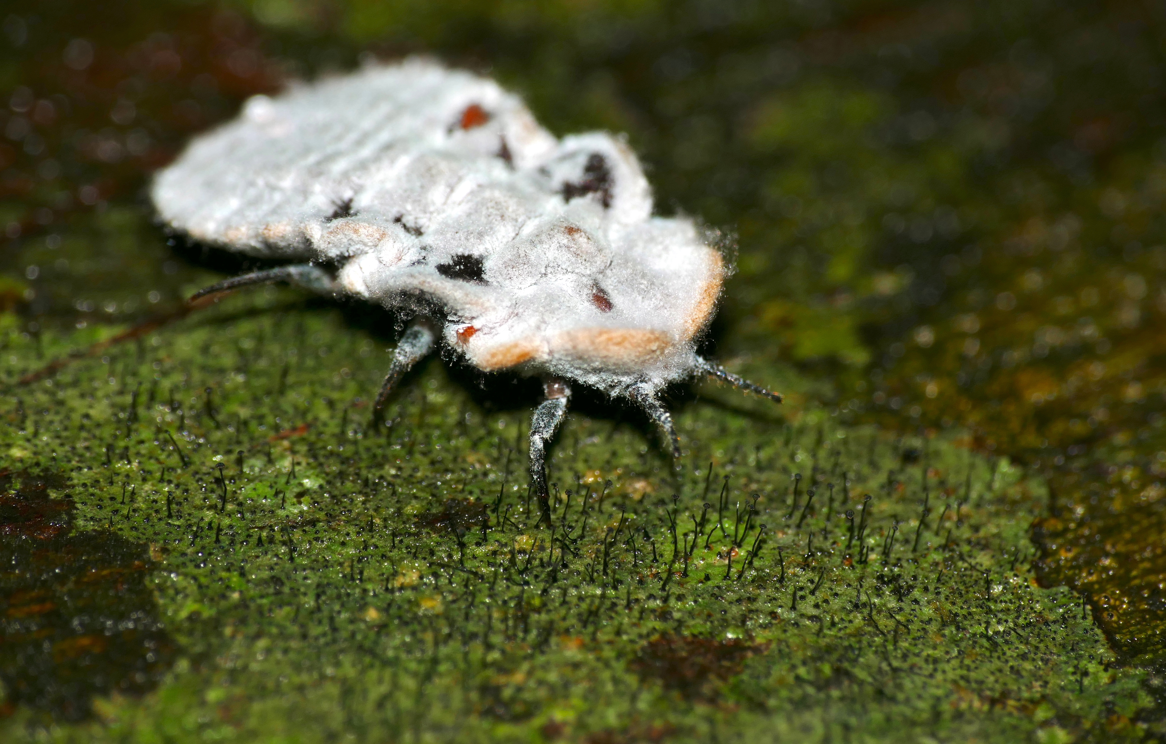 Mulu NP, Sarawak, MALAYSIA